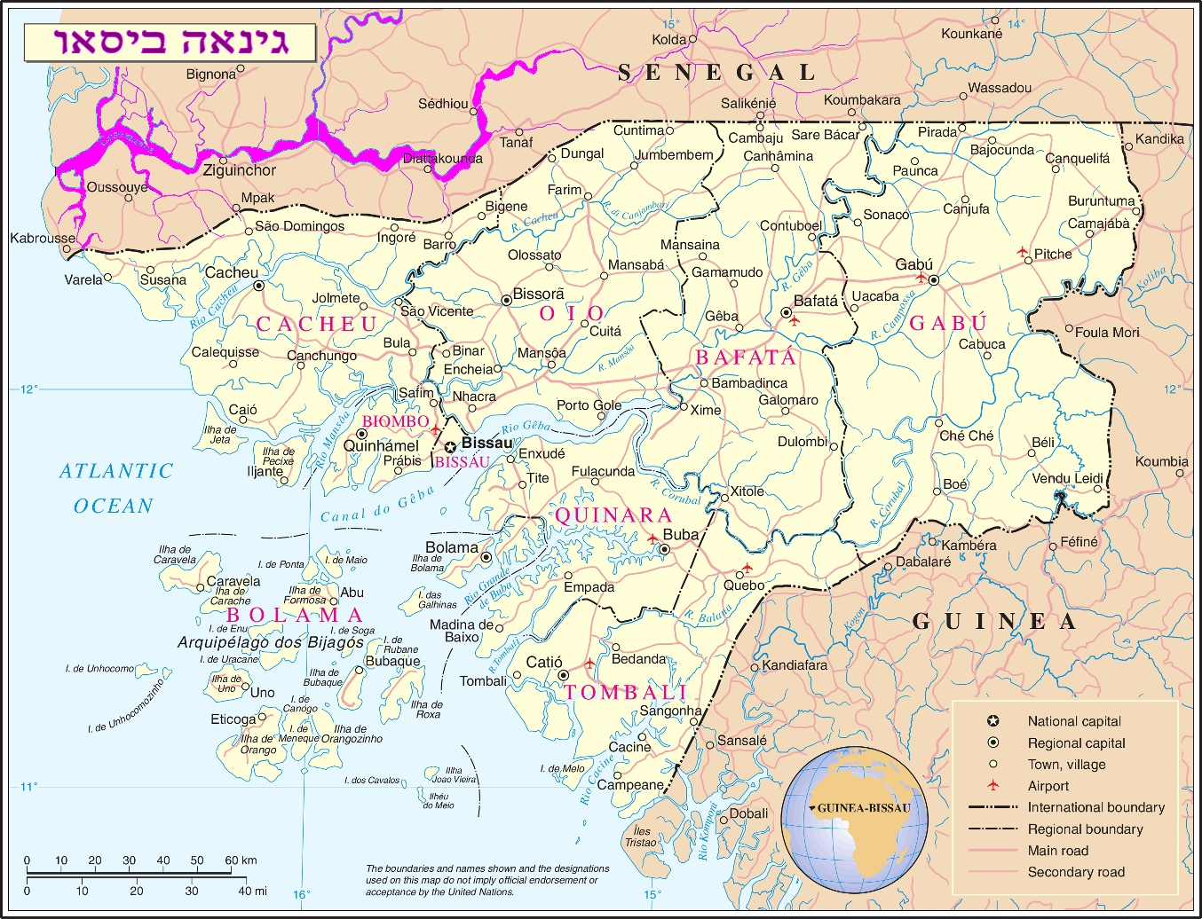 מפת גינאה ביסאו עם נהר קאזמאנסה מודגש